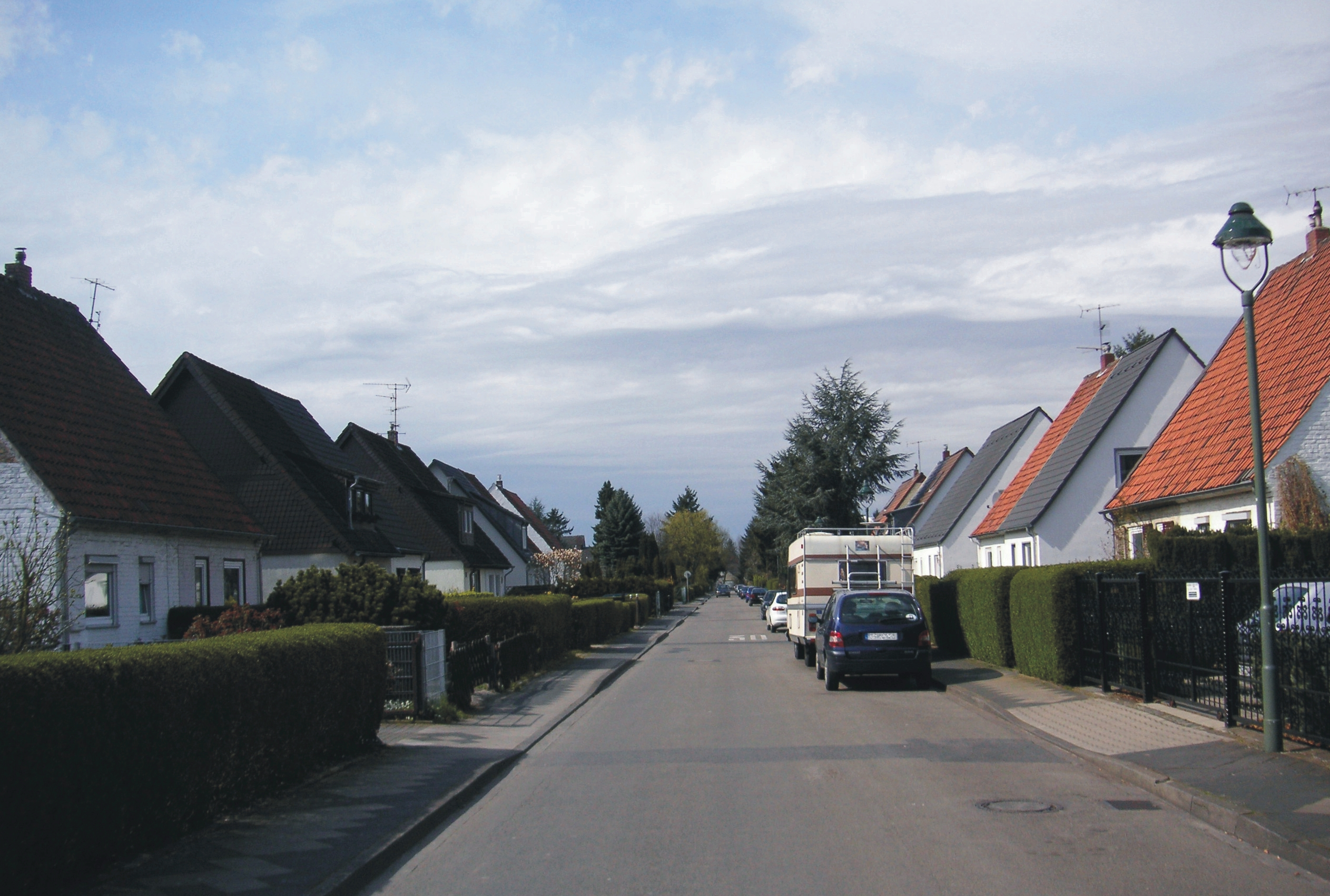 Düsseldorf-Vennhausen, Tannenhofsiedlung